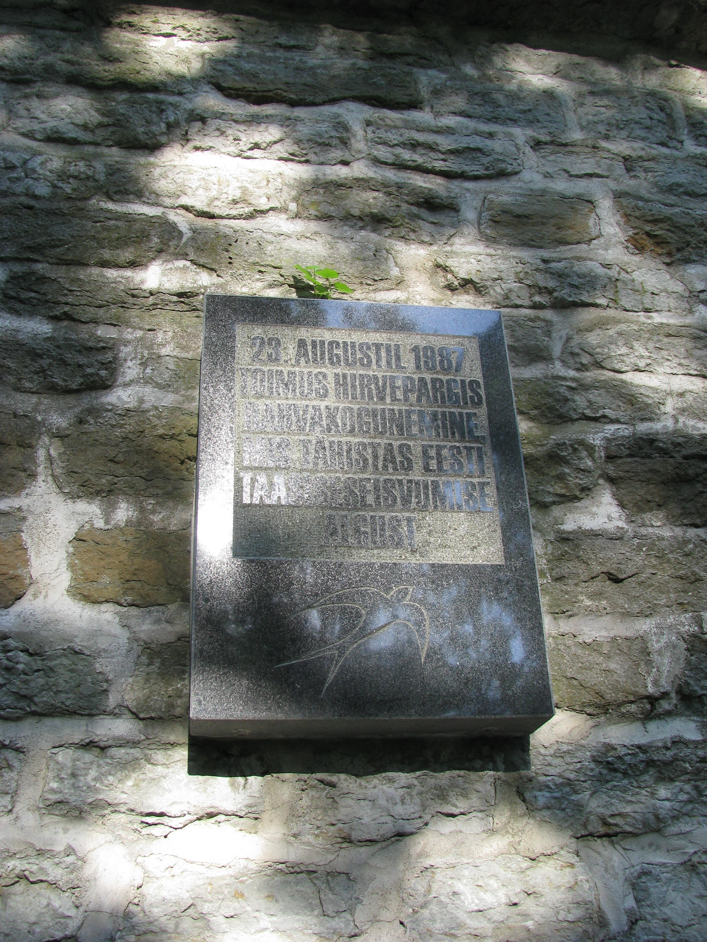 Hirvepargi miitingu mälestustahvel, lähivaade